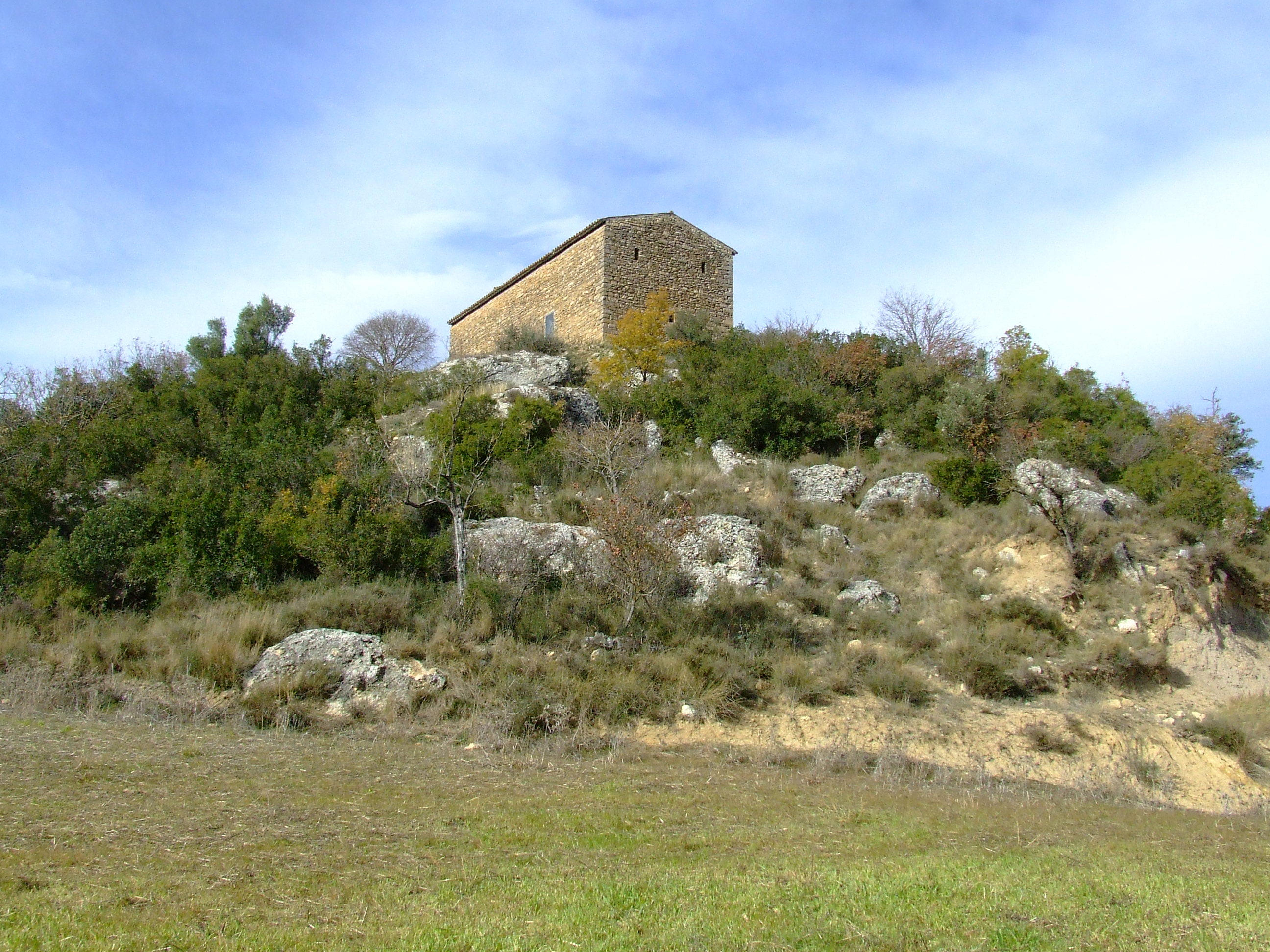 El santuari de la Mare de Déu de les Esplugues des del sud-est (Conques, Isona i Conca Dellà, Pallars Jussà)